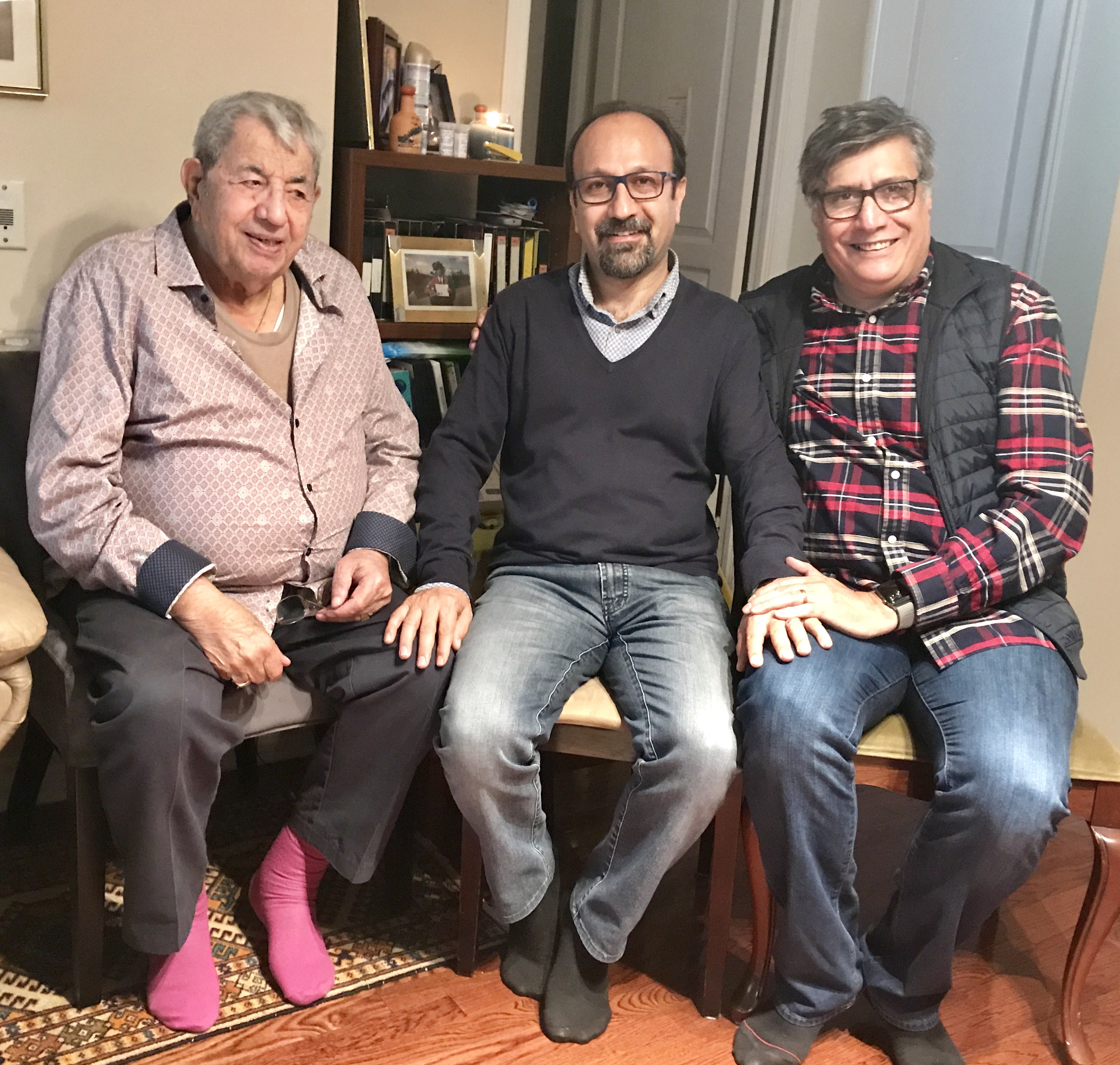 این عکس در منزل آقای عباس جوانمرد در تورنتو گرفته شده است.